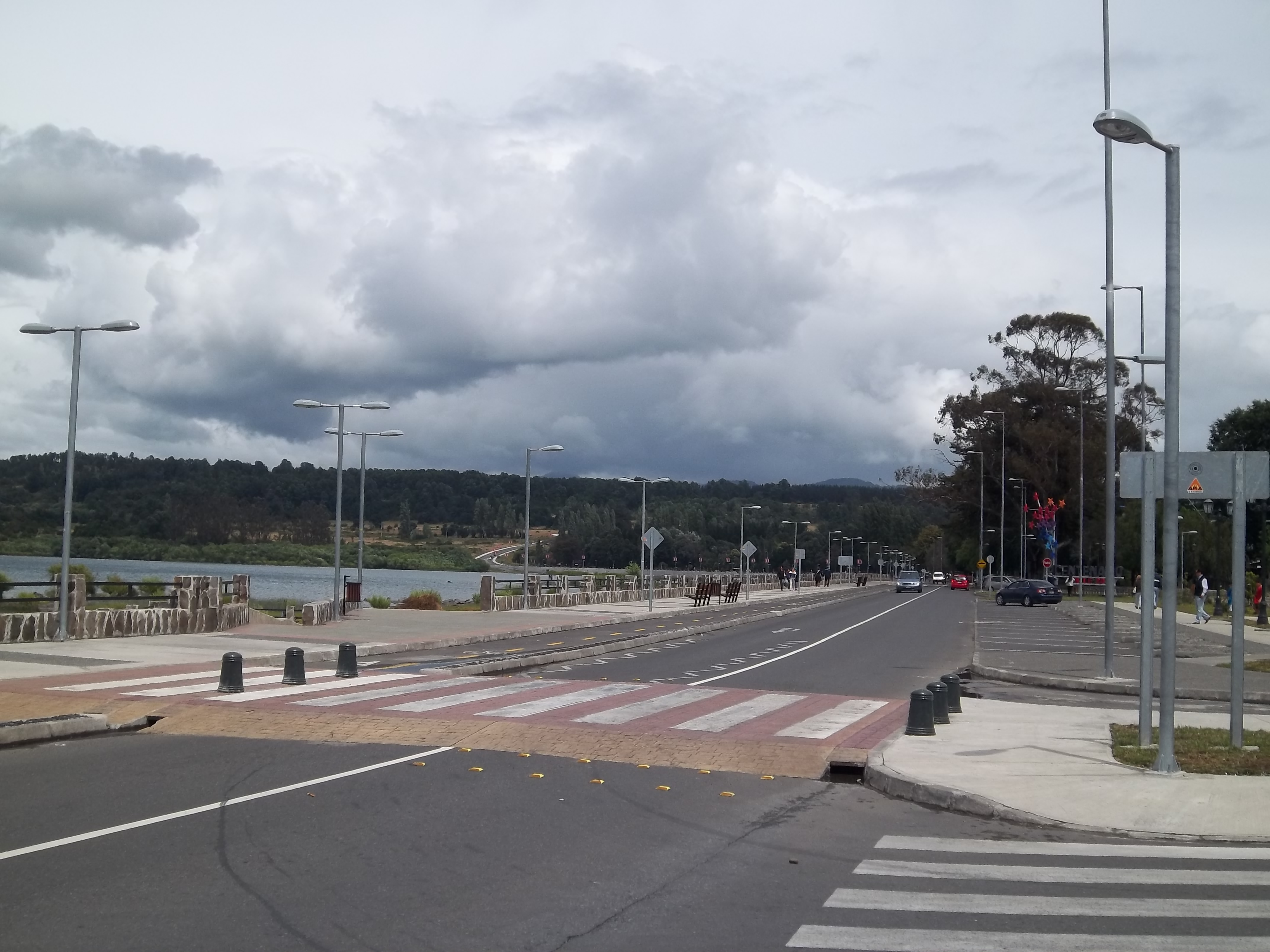 Avenida Costanera Pucará en Villarrica junto al lago del mismo nombre en la región de la Araucanía, en Chile.